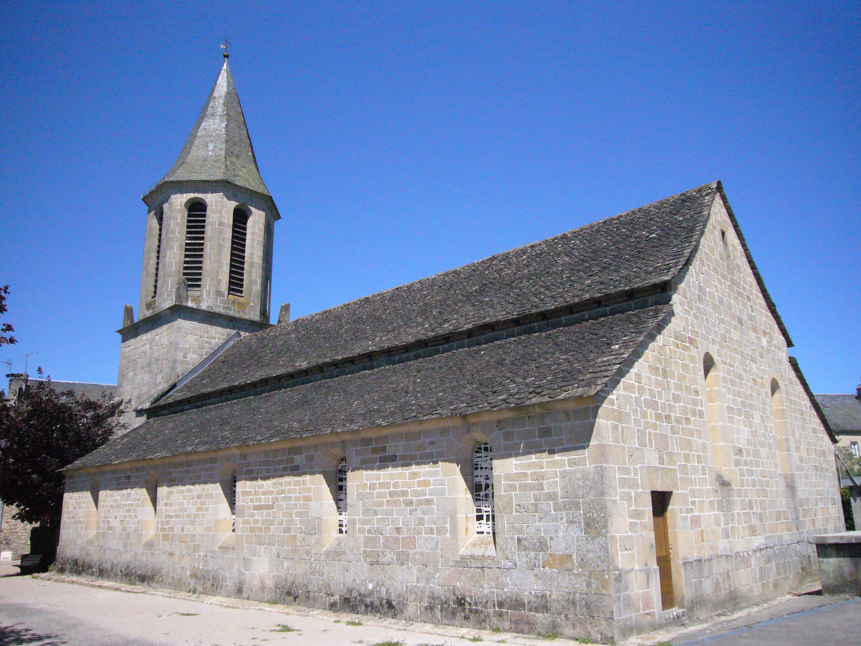 Eglise de Marcillac-la-Croisille (Corrèze, France)